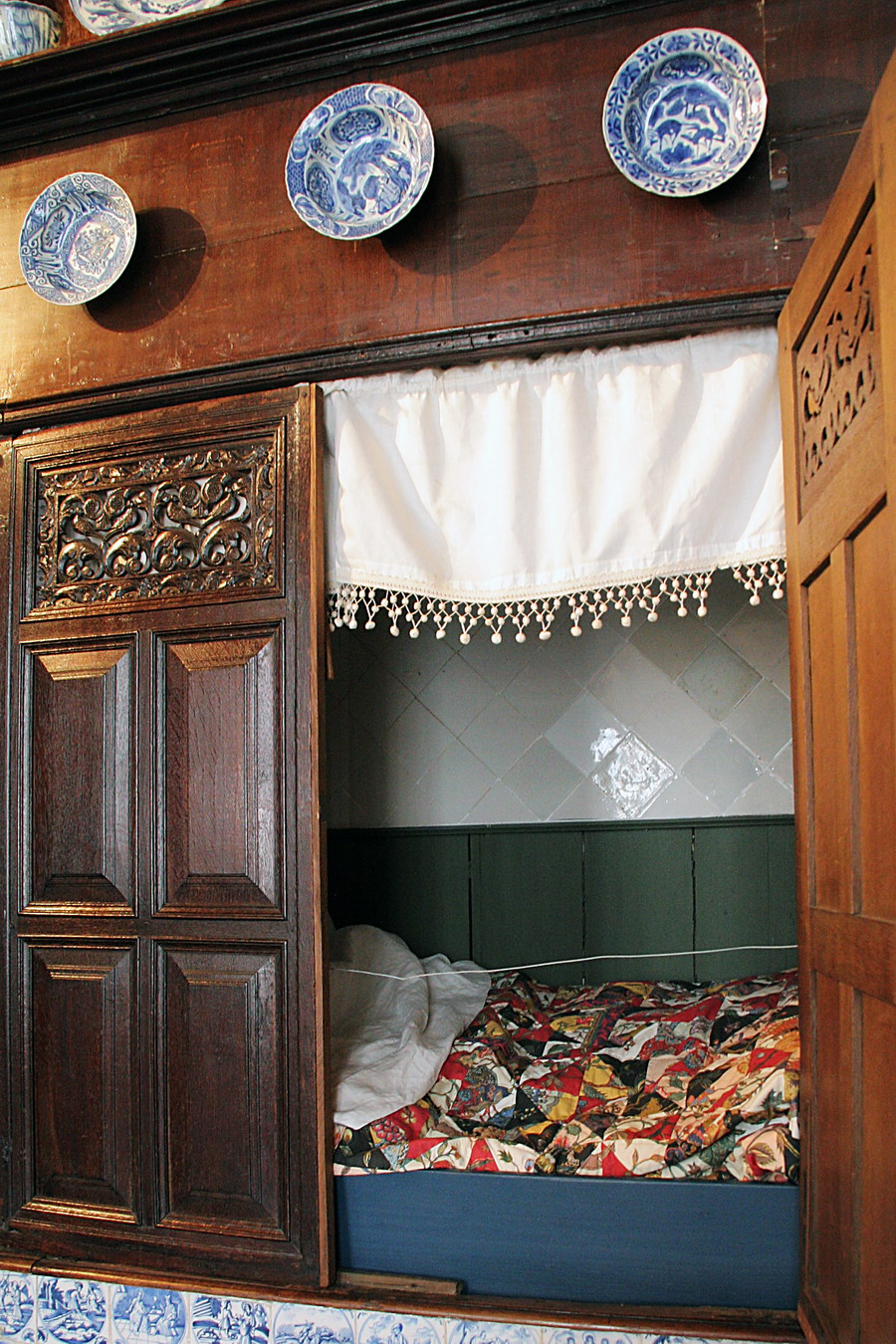 Hindelooper kamer Hindelooper kamers 01